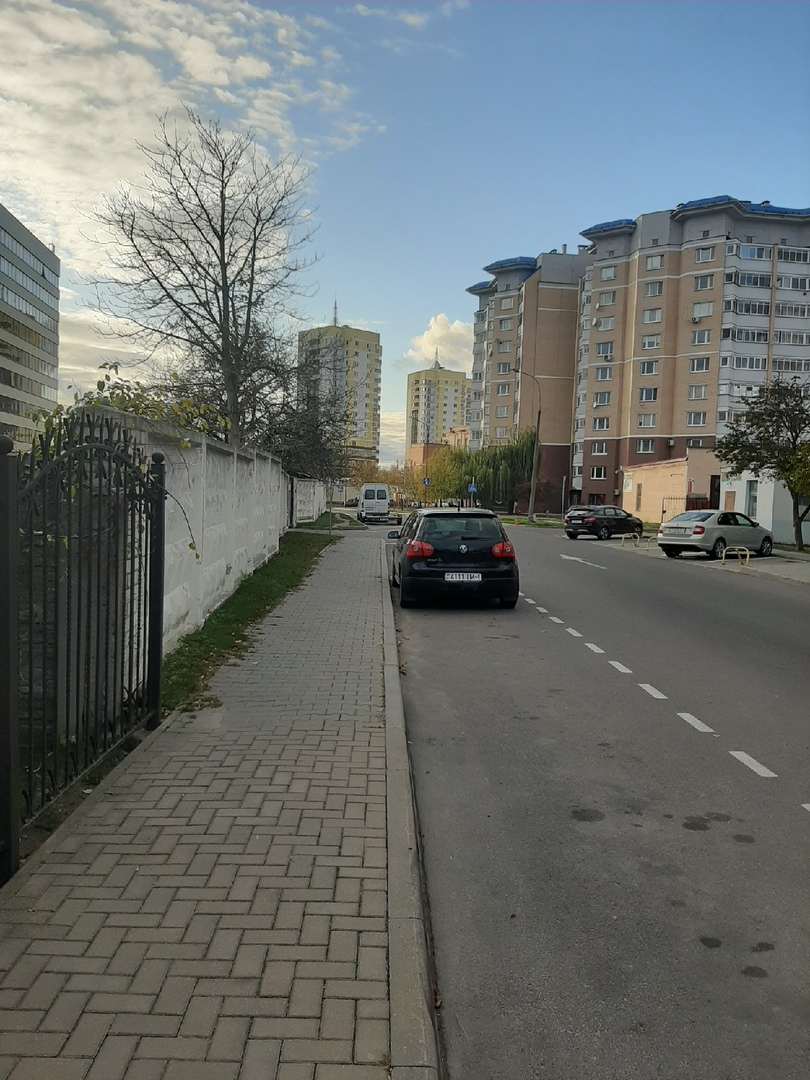 ул.Воровского,Брест